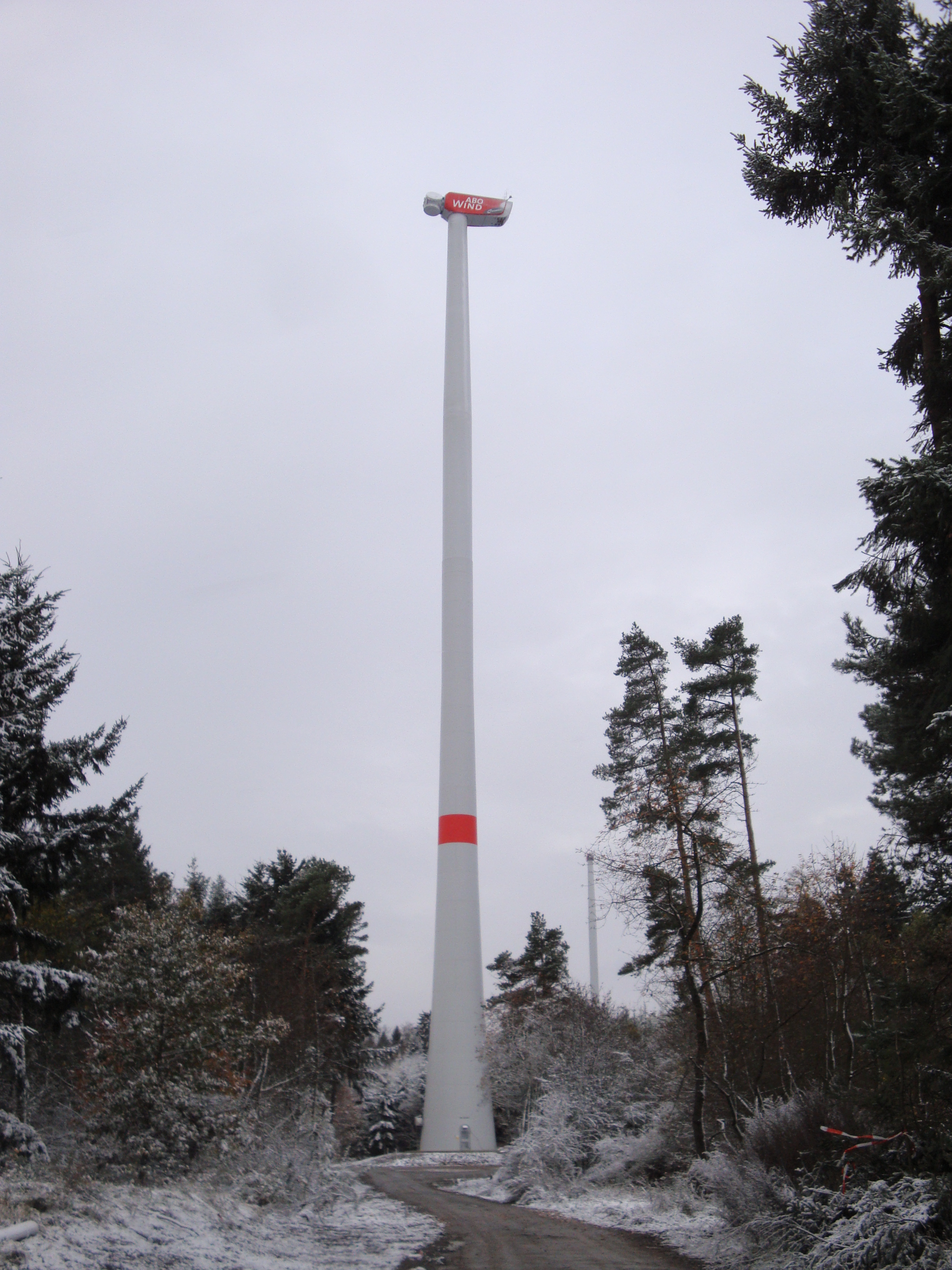 N117 mit montierter Nabe, aber noch ohne Rotorblätter im Windpark Hohenahr